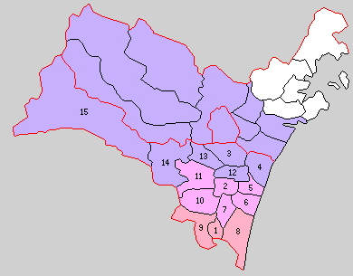 宮城県名取郡の町村。